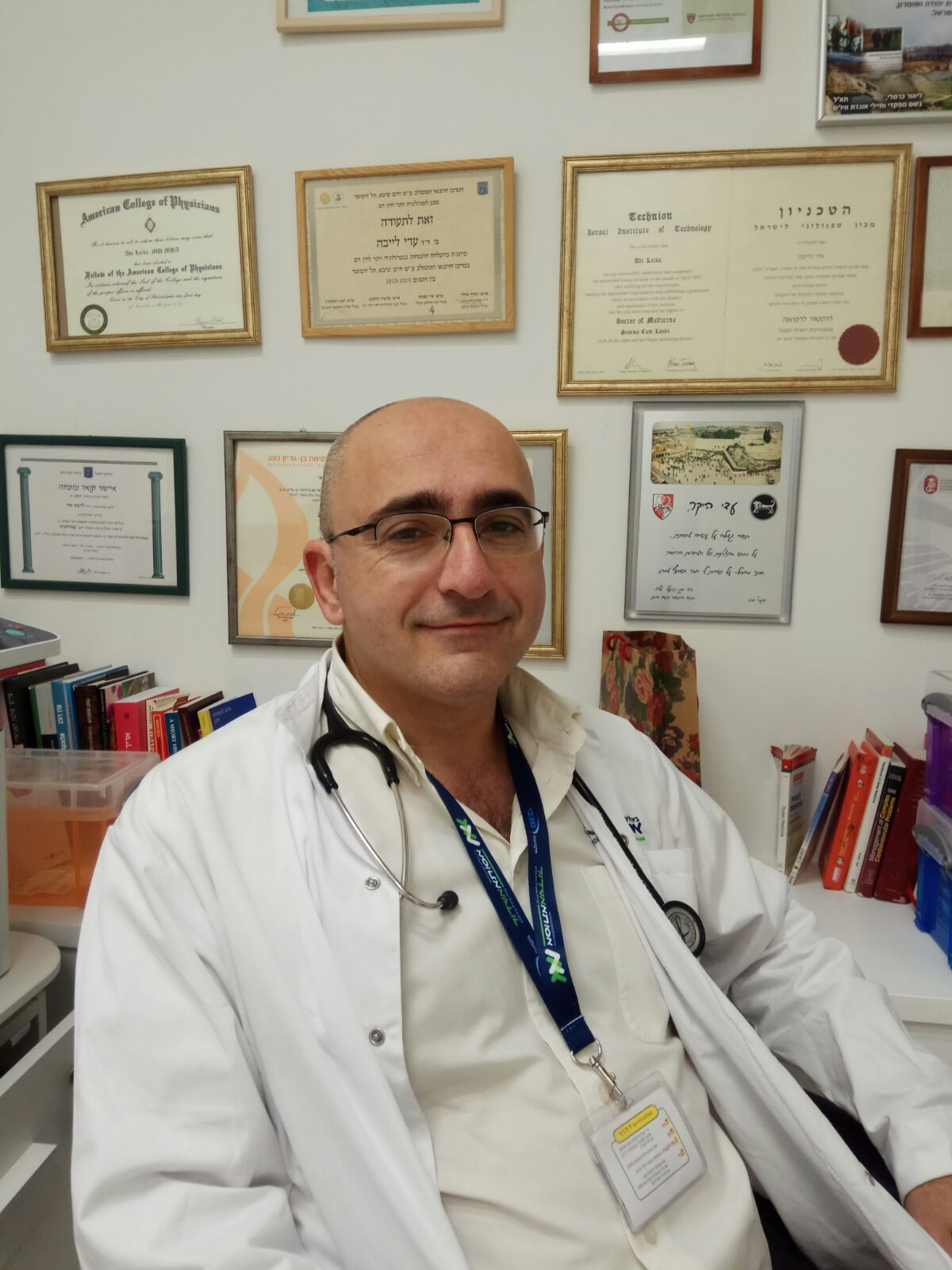 Prof Adi Leiba in the Assuta Ashdod Hospital, Israel, 2019